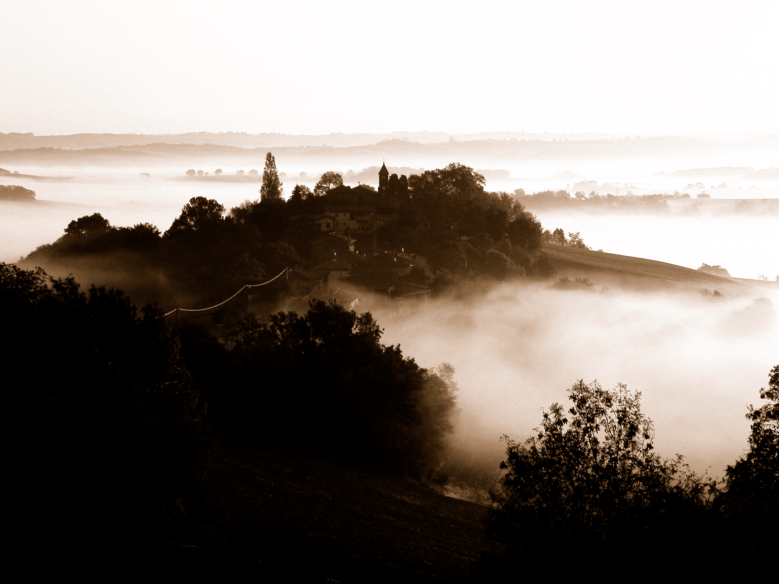 Sieuras village